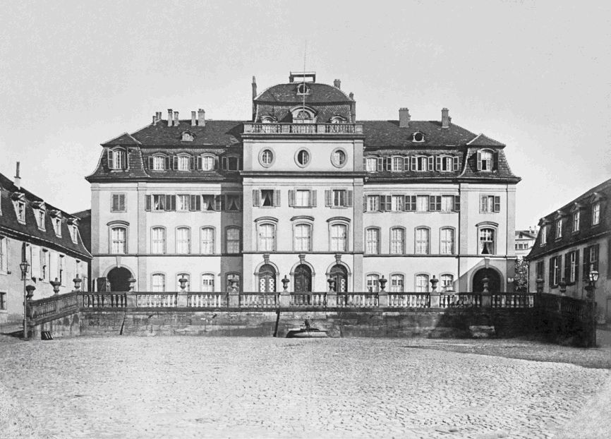 Palais Waitz von Eschen in Kassel, erbaut von Simon Louis du Ry